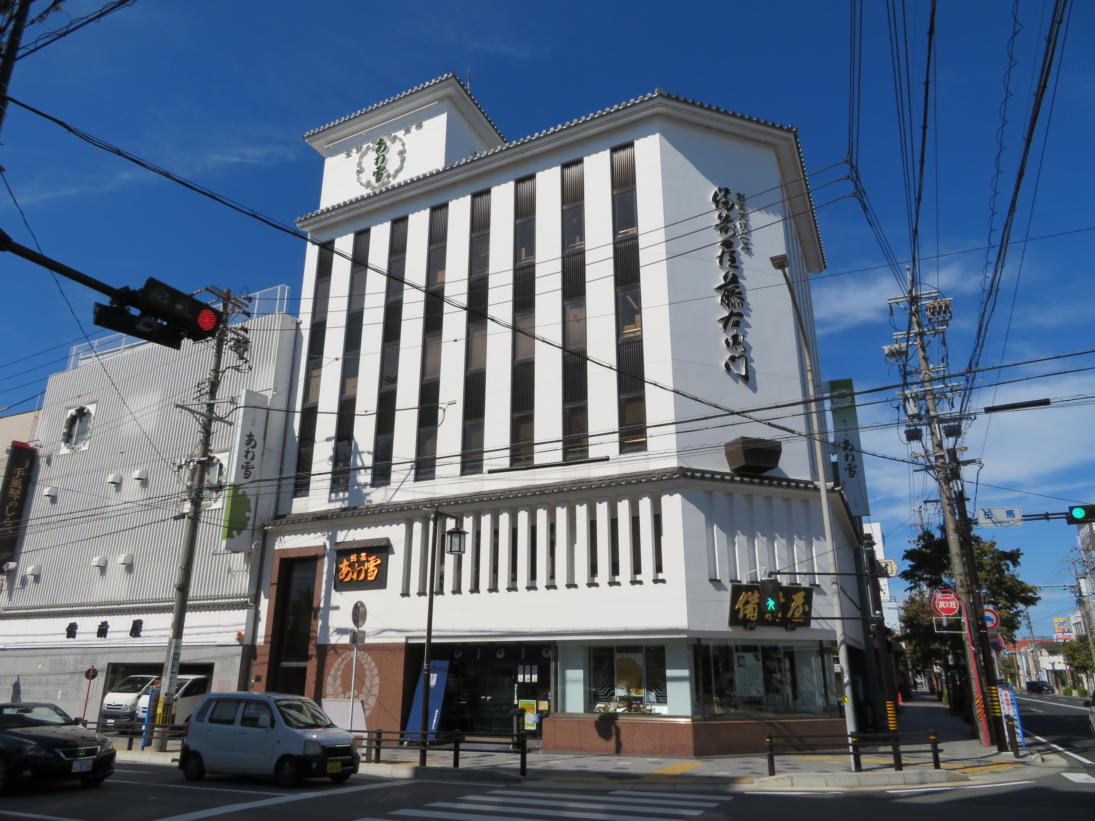 備前屋（岡崎市伝馬通）